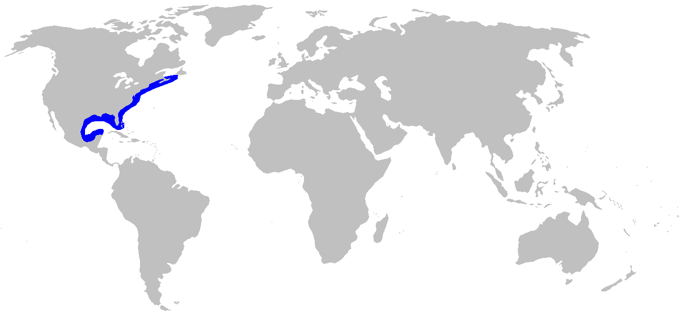 Distribution map for Rhizoprionodon terraenovae